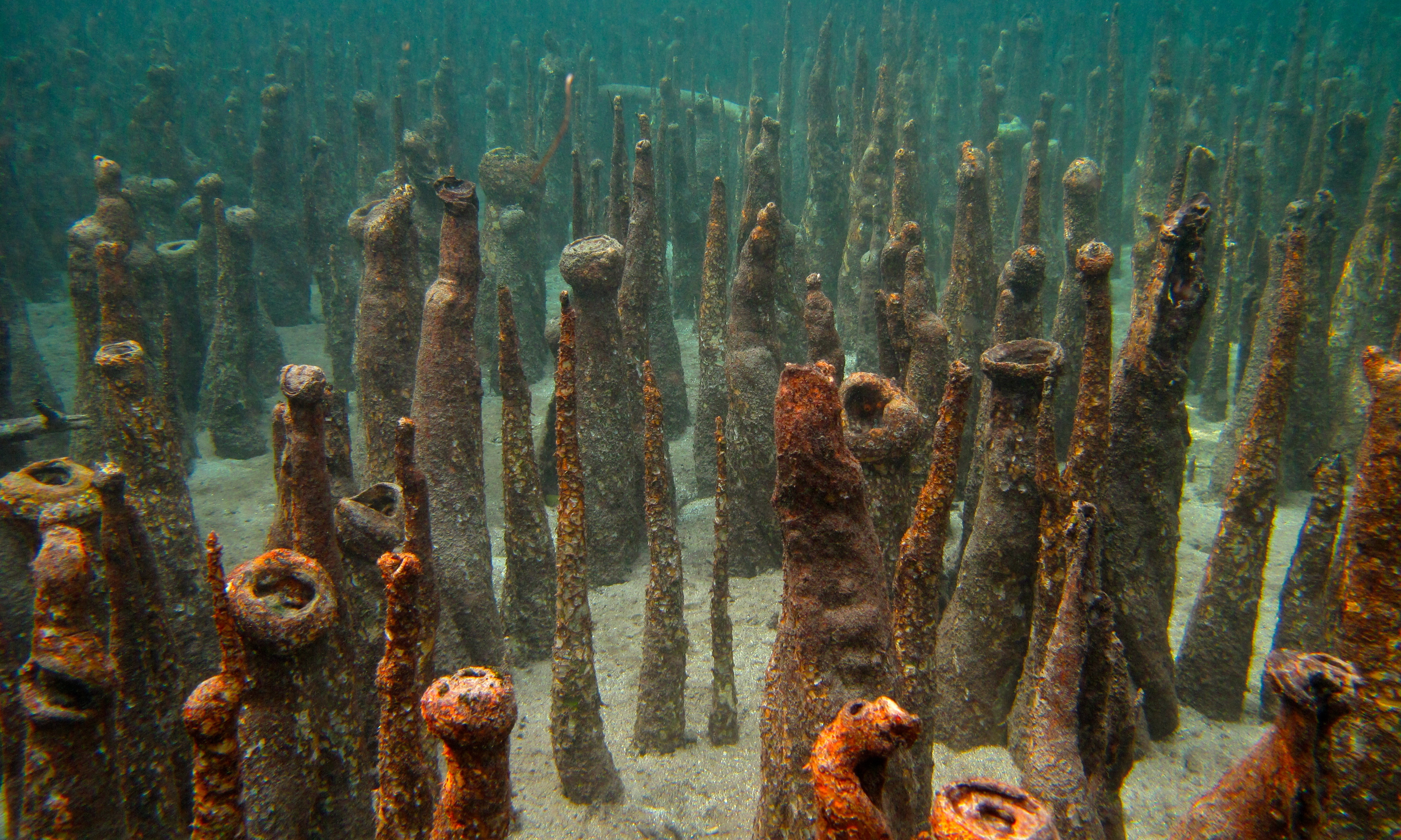 Two Fish, Bunaken Island, Sulawesi, INDONESIA